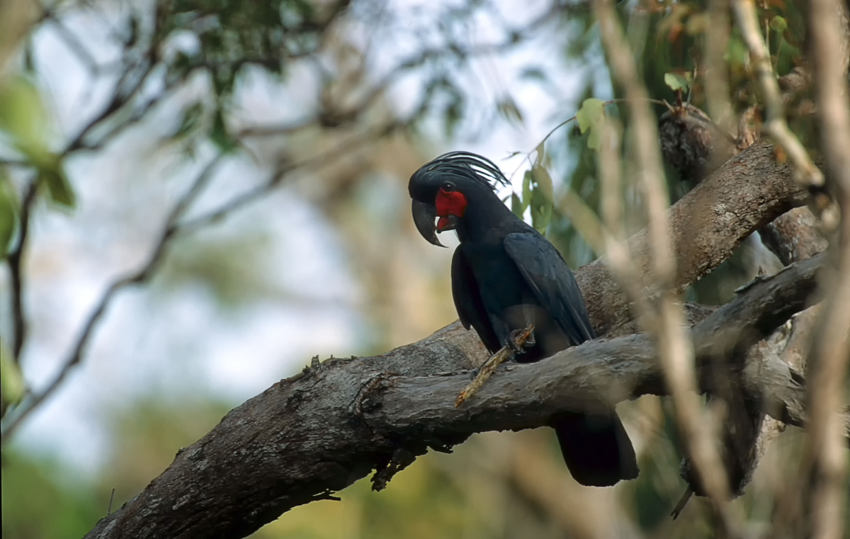 Trommelnder Palmkakadu auf der Kap-York-Halbinsel